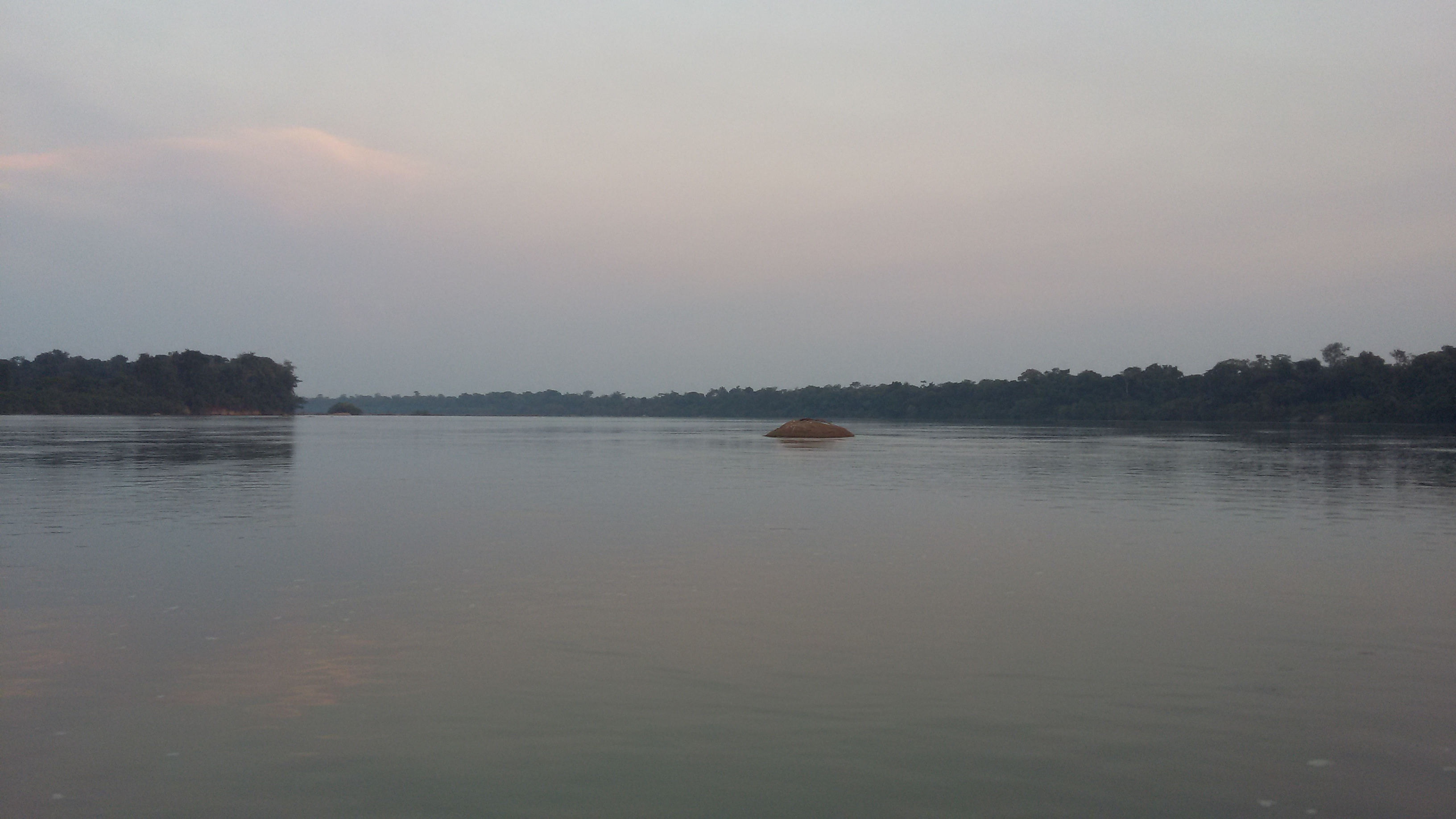 Foto Tirada No final do dia